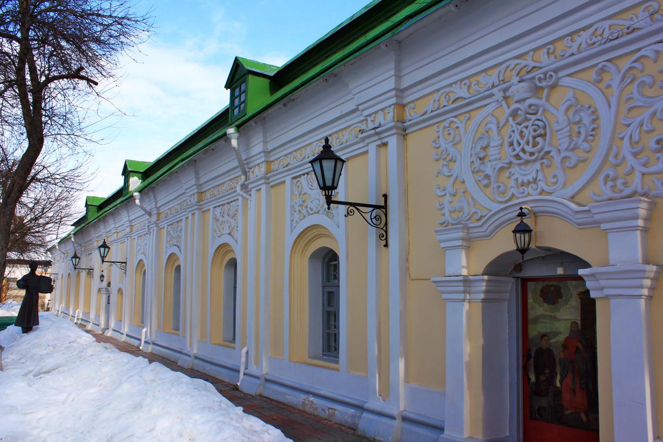 Колегiум (мур.), Переяслав-Хмельницький, вул.Г.Сковороди,54